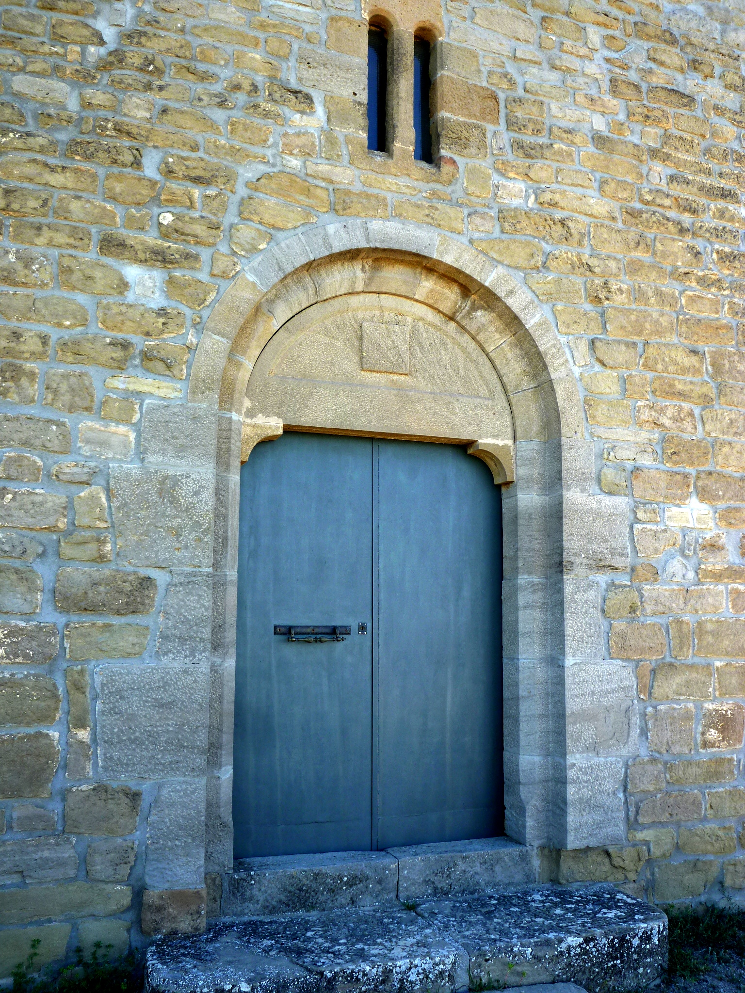 Capella de Santes Creus de Bordell (Pinell de Solsonès): portal